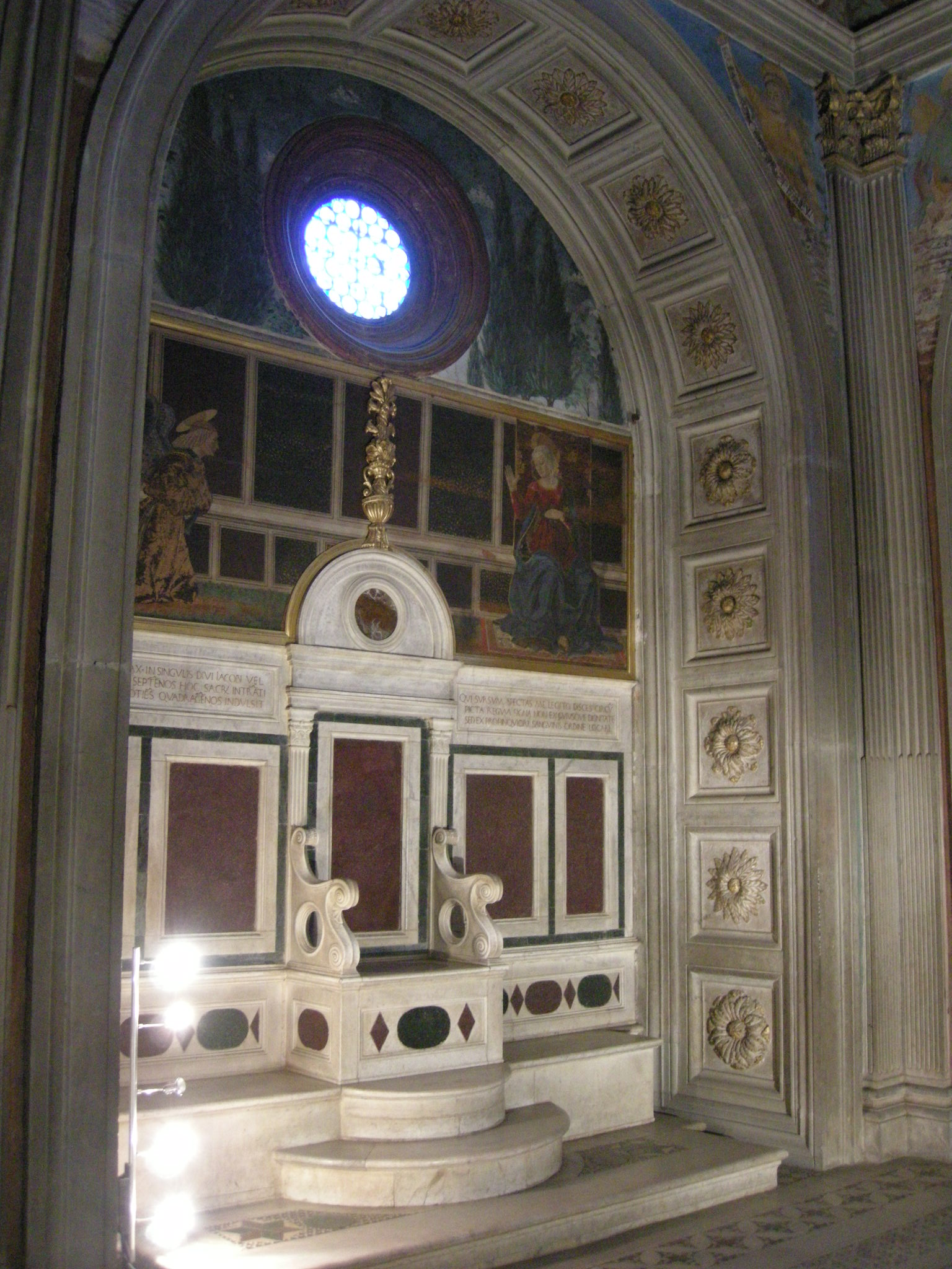 Cappella del cardinale di portogallo 04 sedile e affreschi di alesso baldovinetti